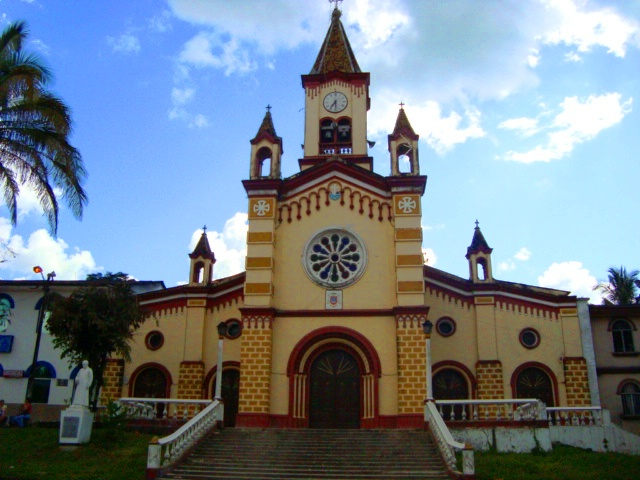 Fachada de la Catedral Nuestra Señora de Lourdes en Florencia (Caquetá)